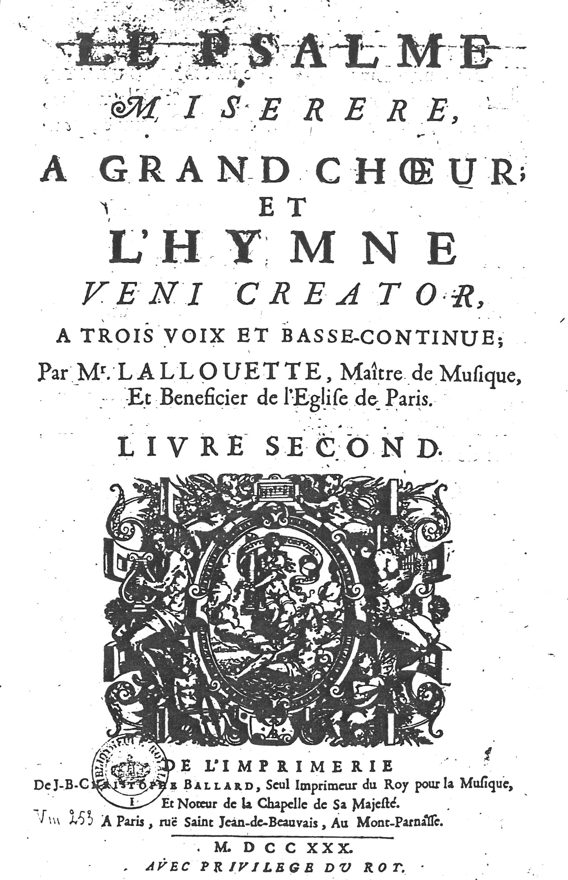 Page de titre de l'édition en 1730 chez Ballard (Paris) de motets mis en musique par Jean François Lalouette (ou Lallouette)